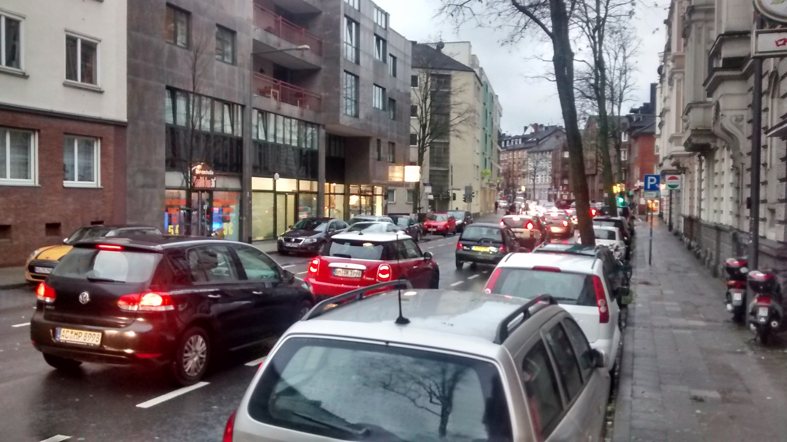 Der Aachener Grabenring im Berufsverkehr an einem Freitagnachmittag im Dezember.